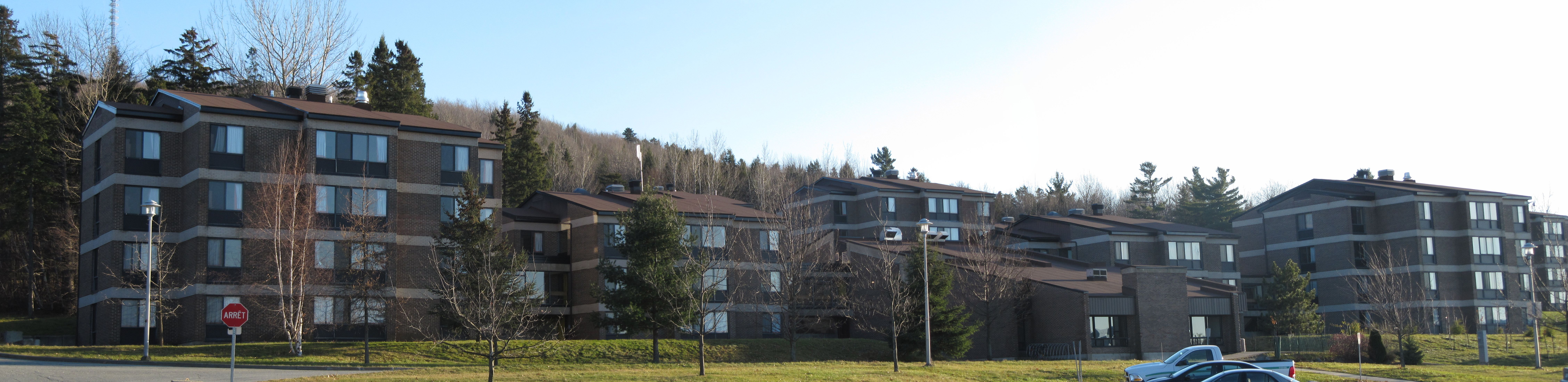 Résidences G11 à G13 de l'Université de Sherbrooke, au pied du mont Bellevue.